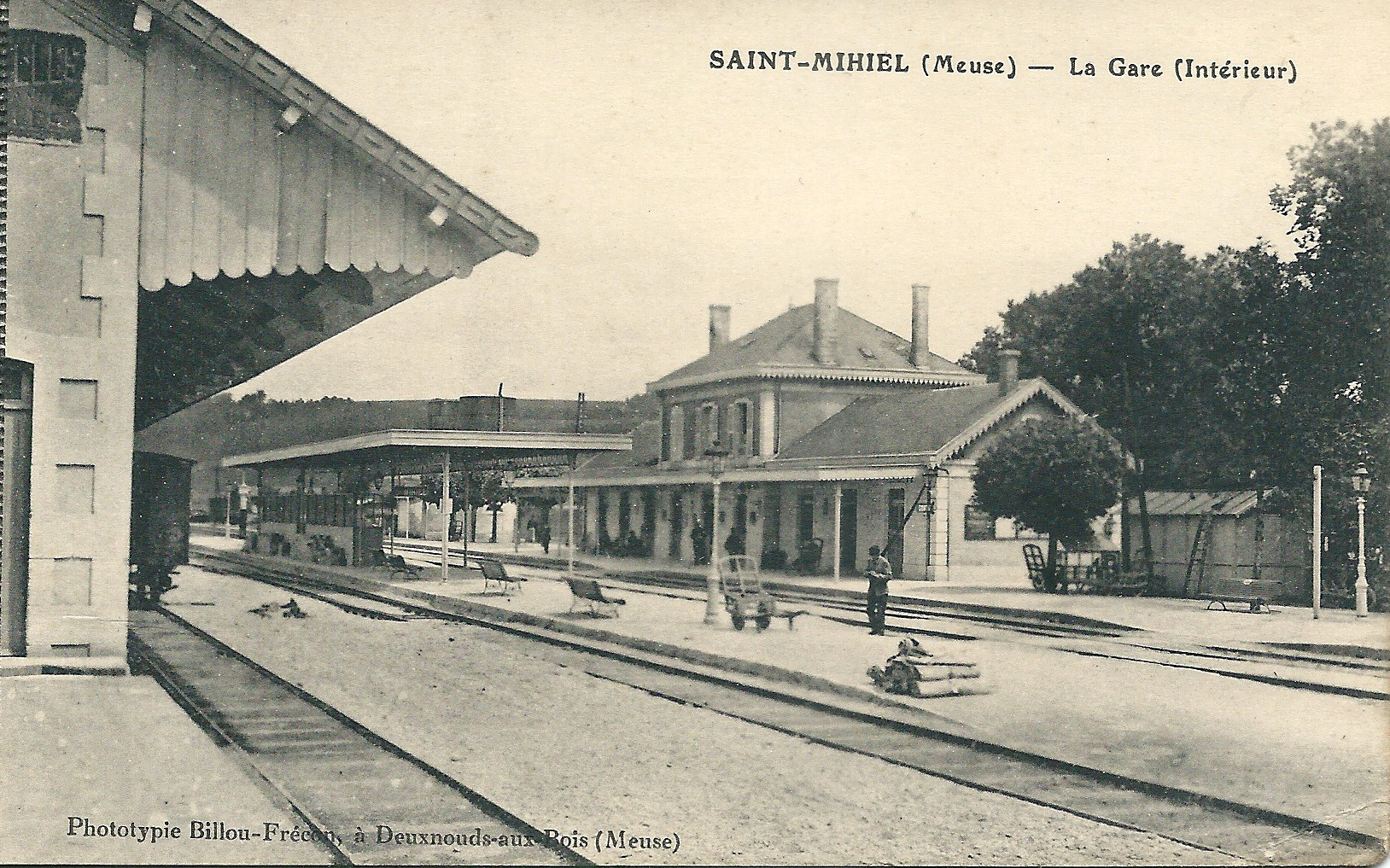 Saint-Mihiel (Meuse, France) , avant 1914.